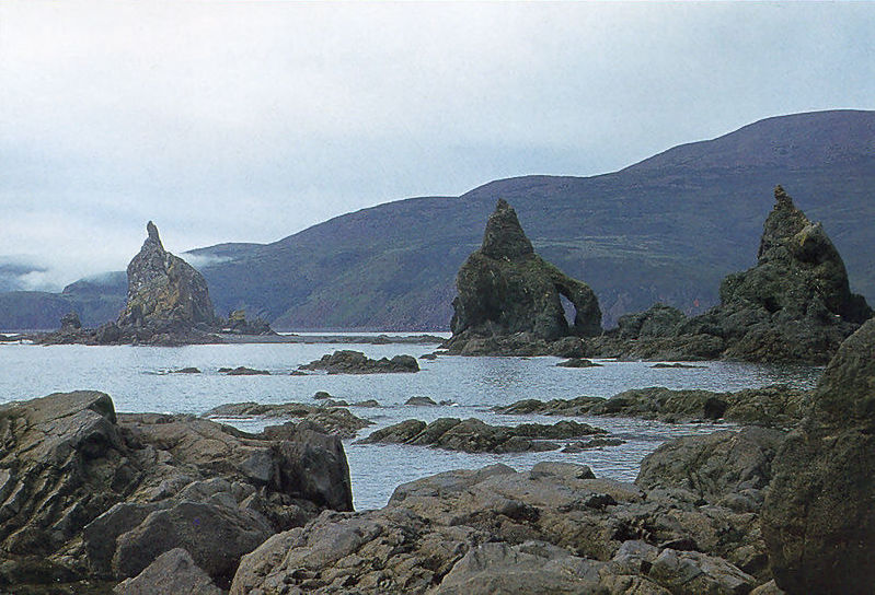 Oural mountains